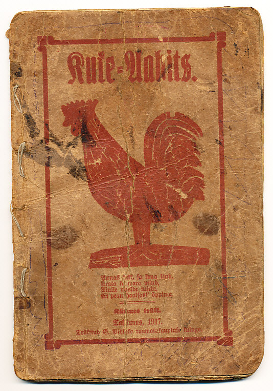 MuuseumikoguArhiivimaterjalidOriginaaloriginaalSäilivusrahuldavEritingimusedeksponeeritavEraldatavad osadMõõdud laius: 12.5 cm; pikkus: 18.5 cm; raamatu maht: 40 lehekülg füüsiline kirjeldus Pappkaantega aabitsa esikaanel pruunis toonis kuke kujutis. Köidetud kahekordse niidiga. sisu kirjeldus 1. Eesti keele tähestik. 2. Lapse õpetajale juhatuseks (August Busch, raamatu toimetaja 1890.a ). 3. 30 peatükki tähtede õppimiseks. 4. 10 käsku. 5. Pühast Ristiusust. 6. Pühast Isa=Meie palwest. 7. Pühast ristimisest. 8. Pühast altari sakramendist. 9. Võõrad tähed. 10. Ladina keele tähed. 11. Kirja märgid. 12. Arwu=tähed ehk numbrid. 13. Ladina ehk Rooma numbrid. 14. Rehkendusmärgid. 15. Wene keele tähed. 16. Wene arwusõnad. 17. Laulusõnad ja palved. 18. Üks=kord=üks.